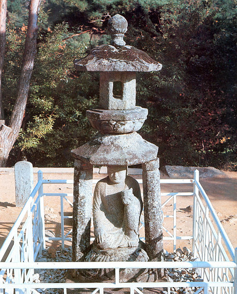 구례 화엄사 사사자삼층석탑 앞 석등